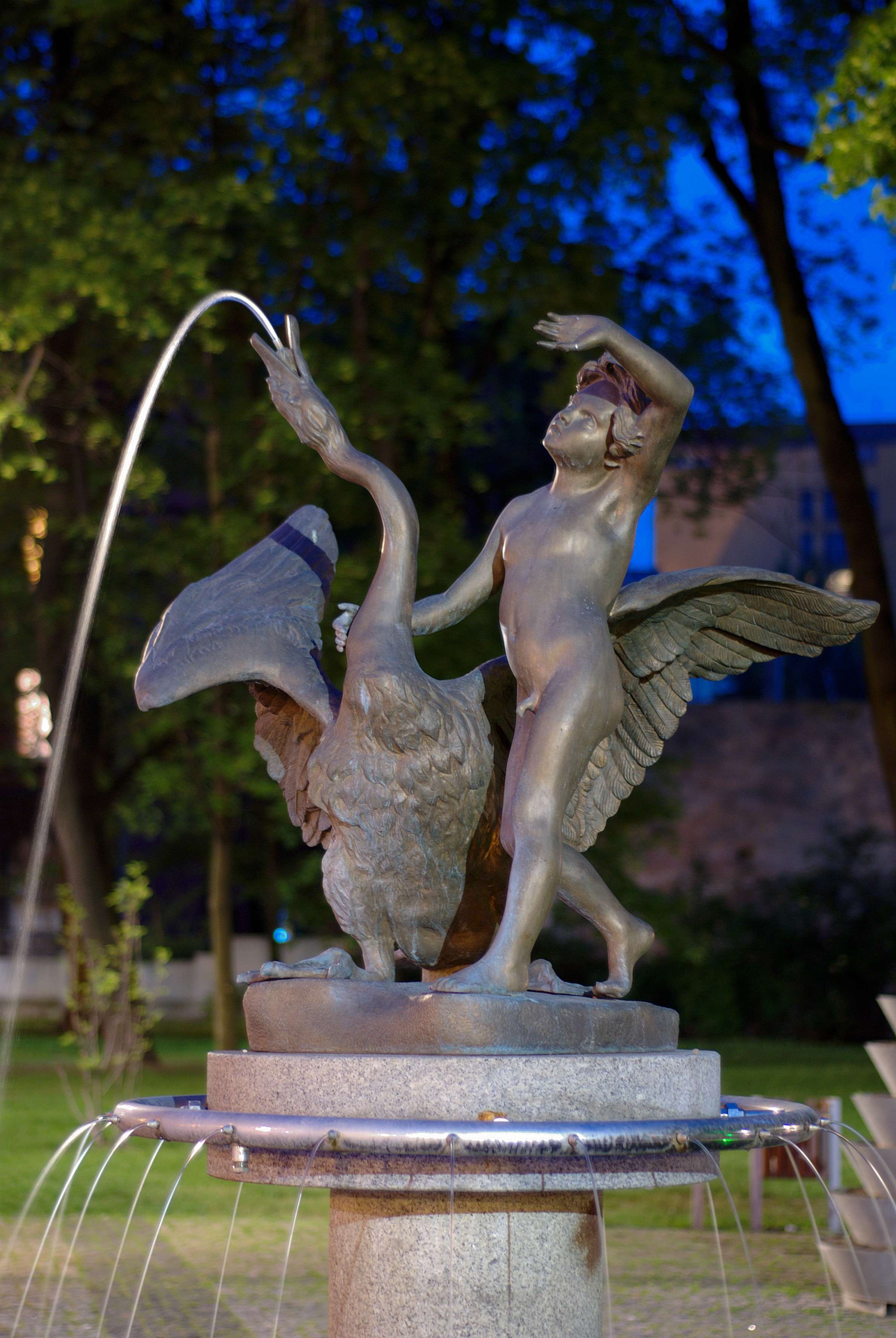 Gliwice. Fontanna "Chłopiec z łabędziem".